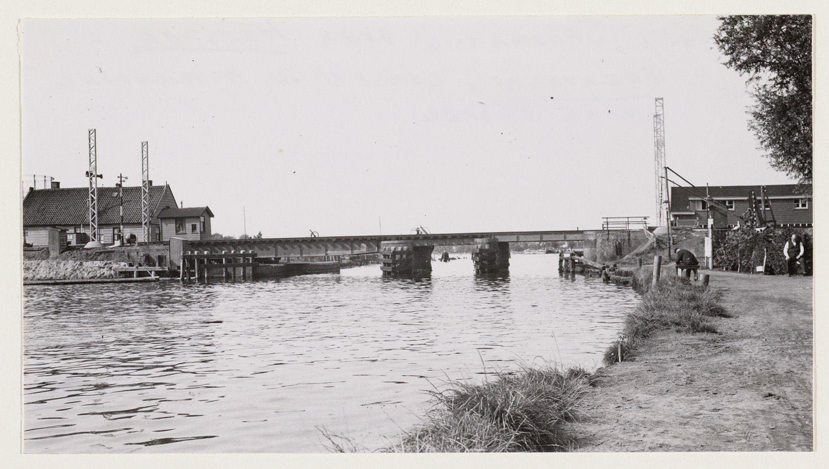 Beschrijving Weespertrekvaart Gezien naar Amstel Documenttype foto Vervaardiger Eck, J. van (Jacobus, 1873-1946) Collectie Collectie J. van Eck: foto's Datering 5 september 1937 Geografische naam Weespertrekvaart Amstel Inventarissen Afbeeldingsbestand A01634001135 Generated with Dememorixer